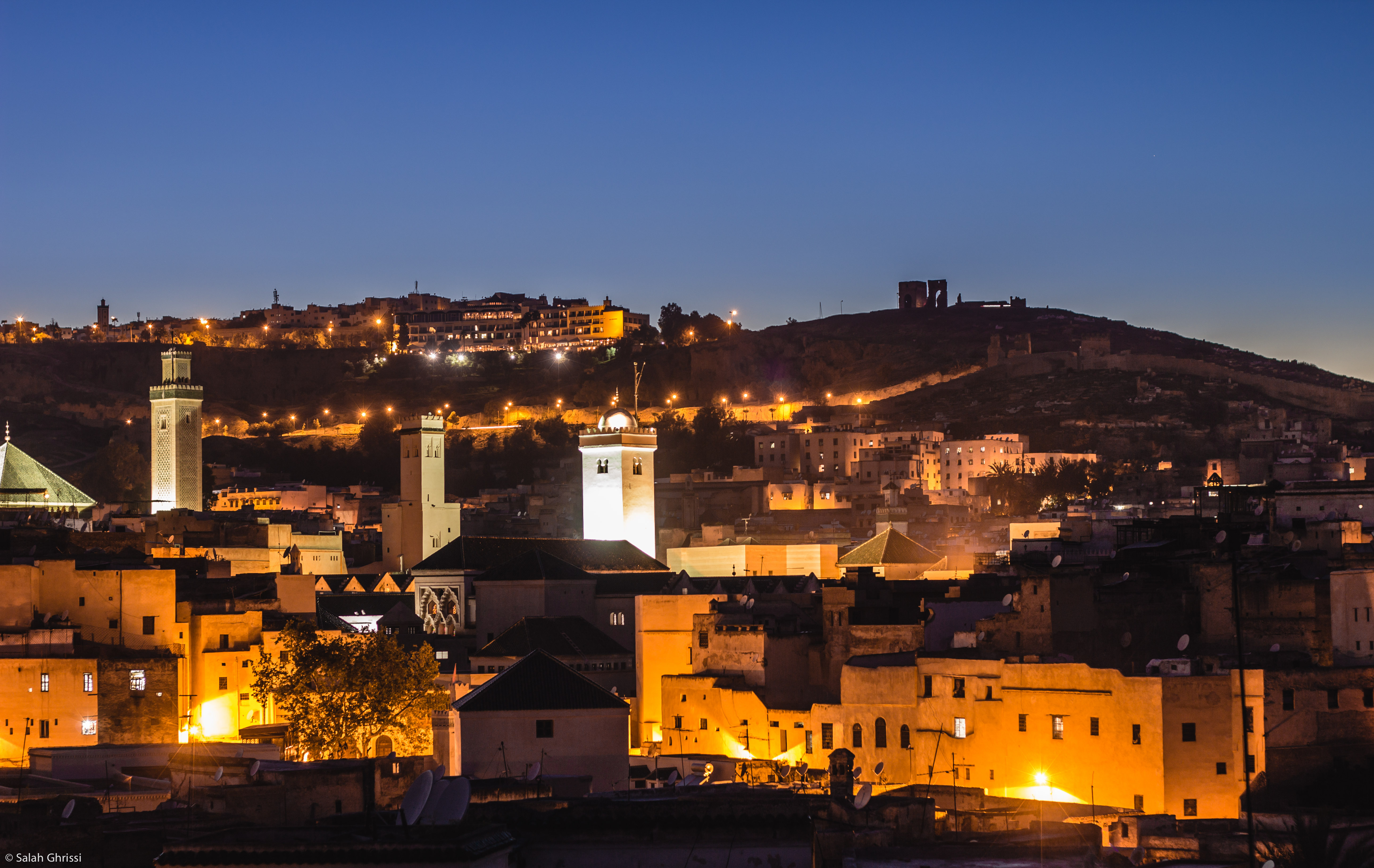 Vue sur la médina photographiée en longue exposition